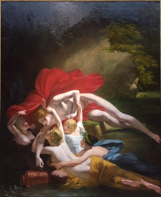 Pierre-Jérôme Lordon, Hylas et les nymphes, 1812, Angers, musée des Beaux-Arts